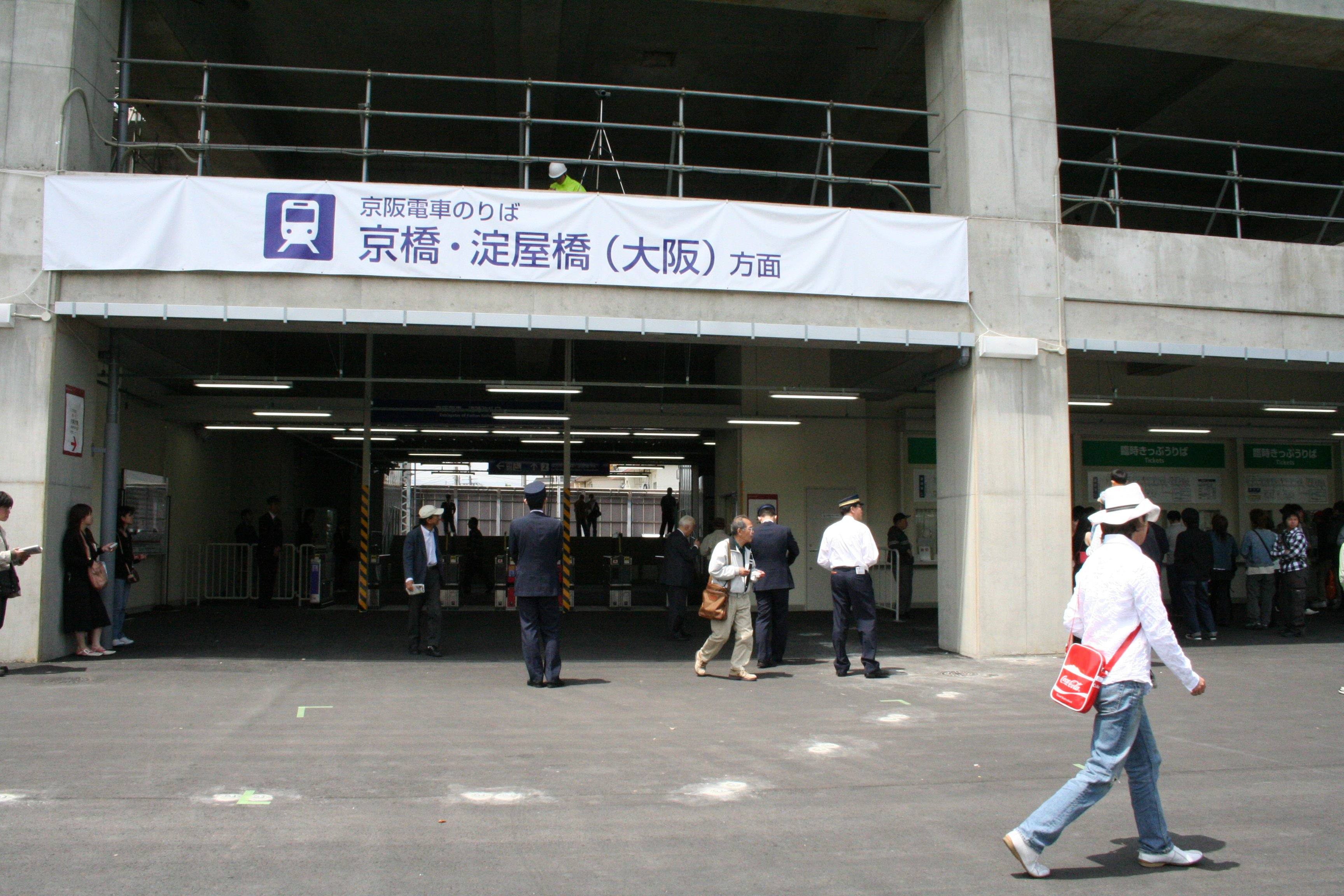 京阪電鉄 淀駅（淀屋橋方面、京都競馬開催時臨時改札口） 撮影日: 2006年4月30日 撮影者: Goki